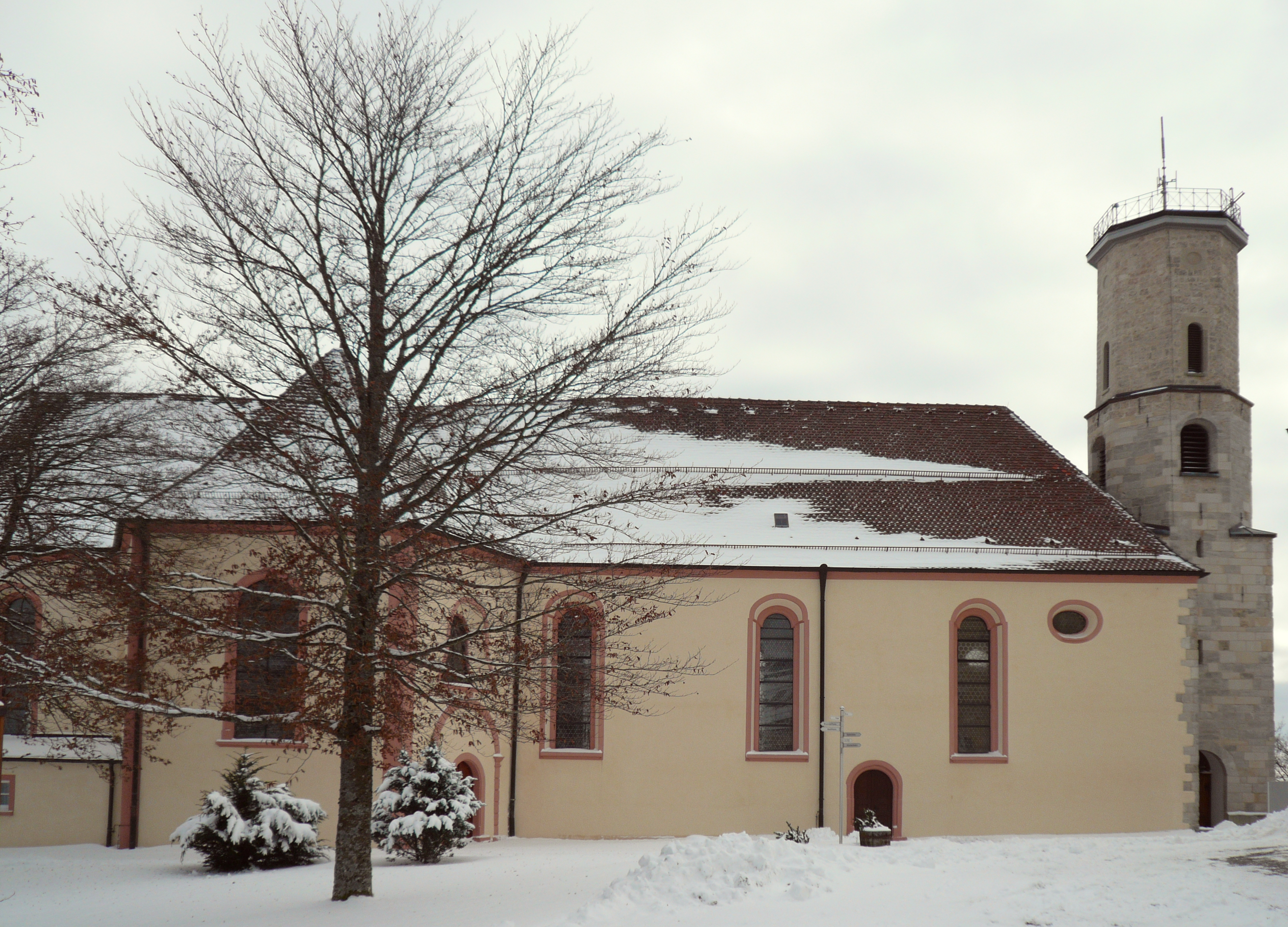 Dreifaltigkeitskirche on Dreifaltigkeitsberg near Spaichingen